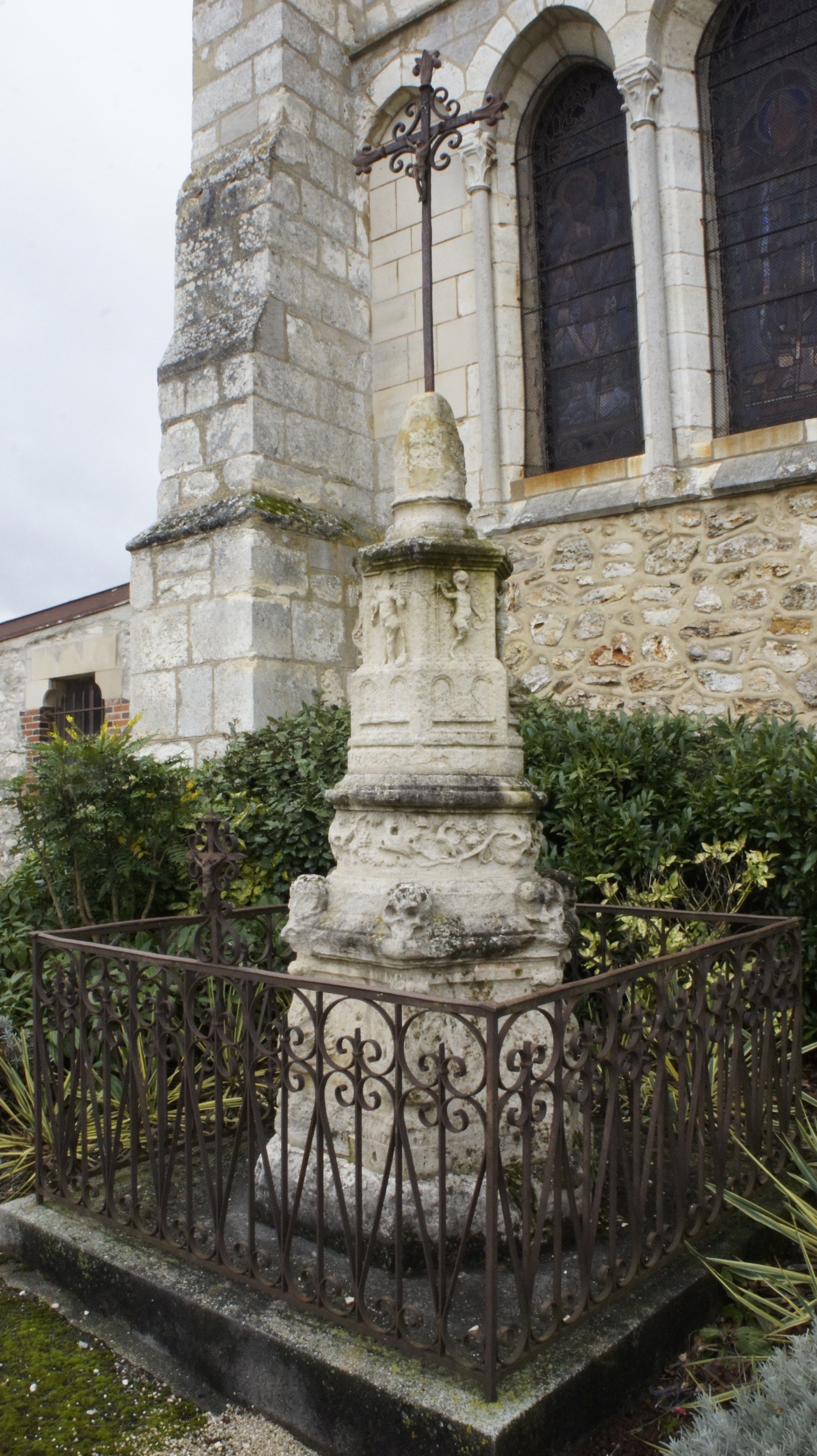 Vue du calvaire devant l'église à Cuis .